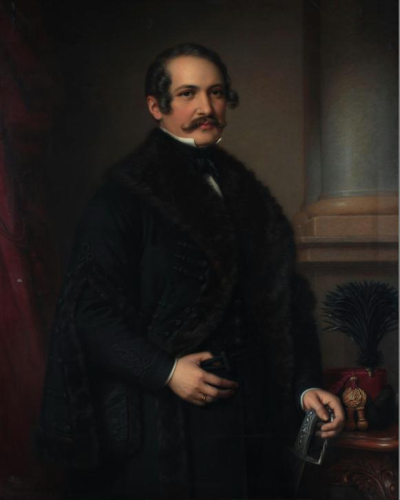 Jeszenák János magyar politikus, kormánybiztos, főispán, az 1848–49-es forradalom és szabadságharc vértanúja.